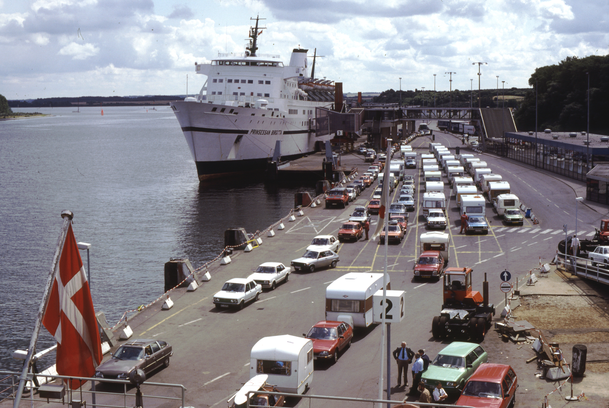 Skandinavienkai in Lübeck-Travemünde im Sommer 1981. Hinten hat die "Prinsessan Birgitta" angelegt.